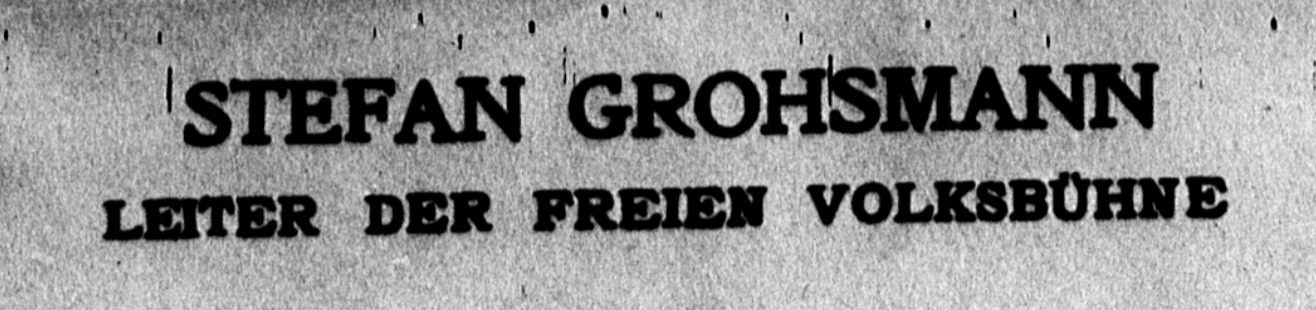 Briefkopf von Stefan Grossmann, Leiter der Freien Volksbühne (Wien) 1911